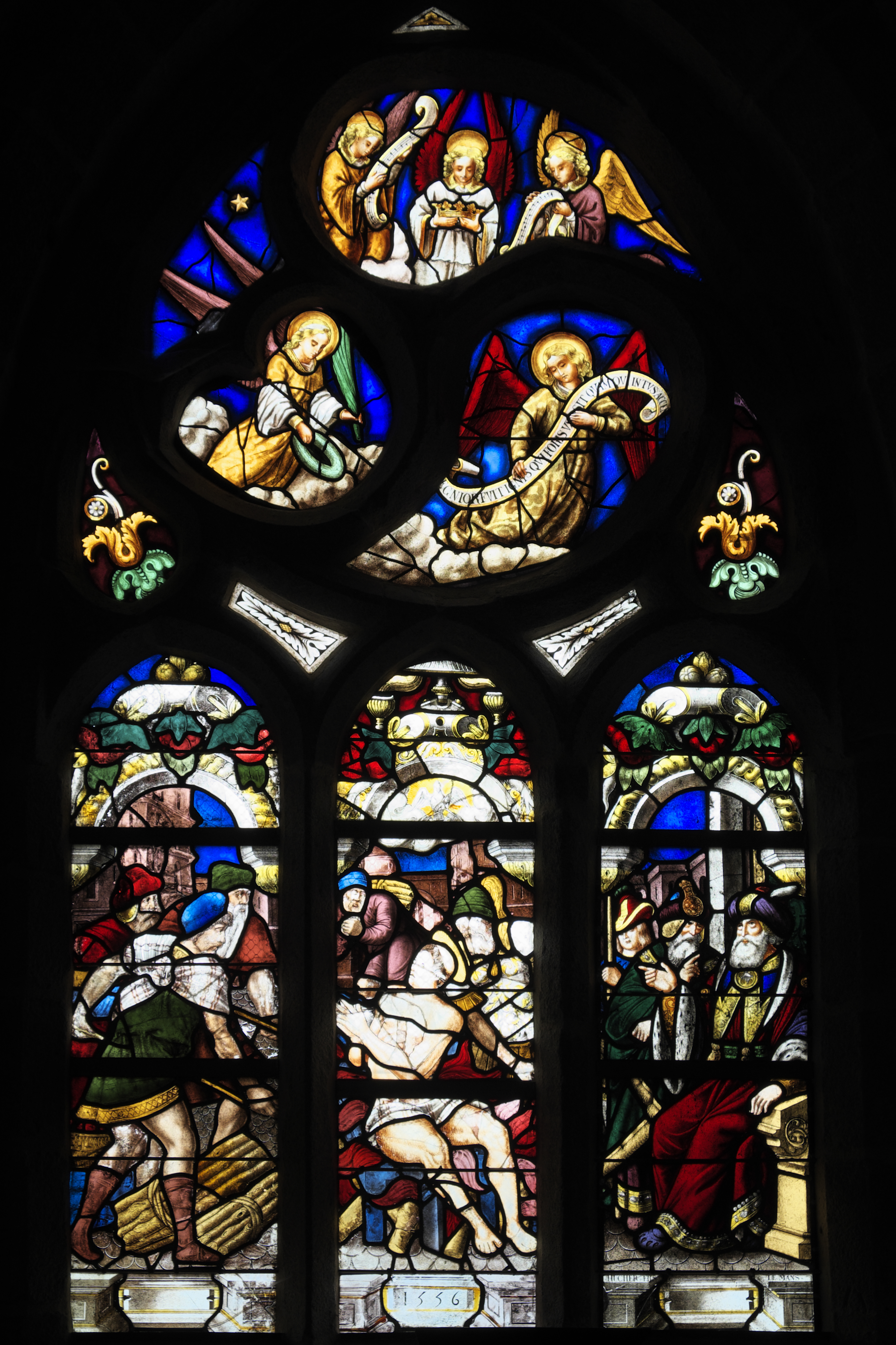 Fenster des Martyriums des heiligen Laurentius in der Kapelle Saint-Herbot in Saint-Herbot (Plonévez-du-Faou) im Département Finistère (Region Bretagne/Frankreich), Bleiglasfenster (baie 1) von 1556, 1886 von Eugène und Ferdinand Hucher in der Glasmalereiwerkstatt der Karmelitinnen von Le Mans restauriert; Darstellung: Martyrium des heiligen Laurentius